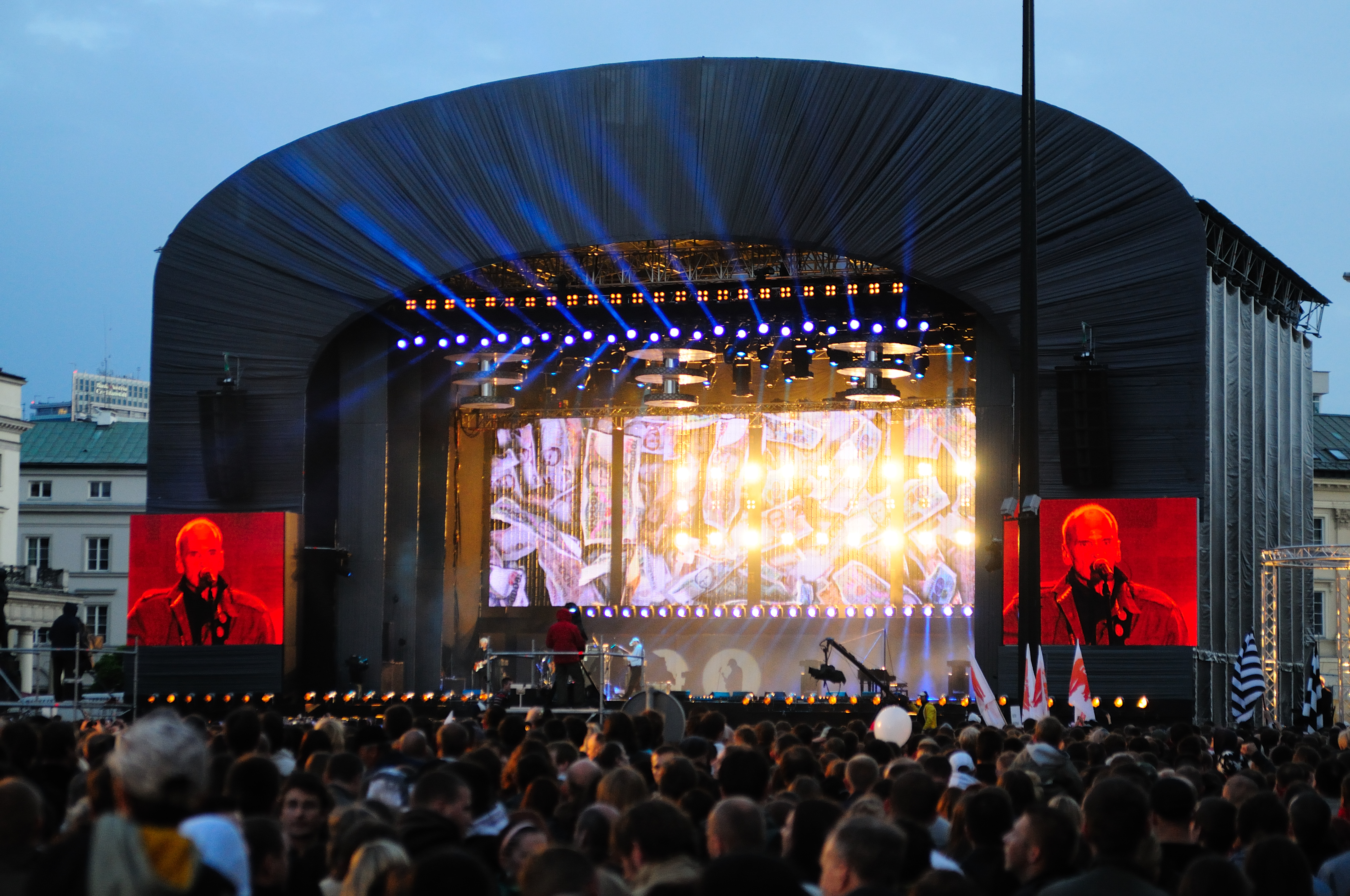 Koncert "4. czerwca"